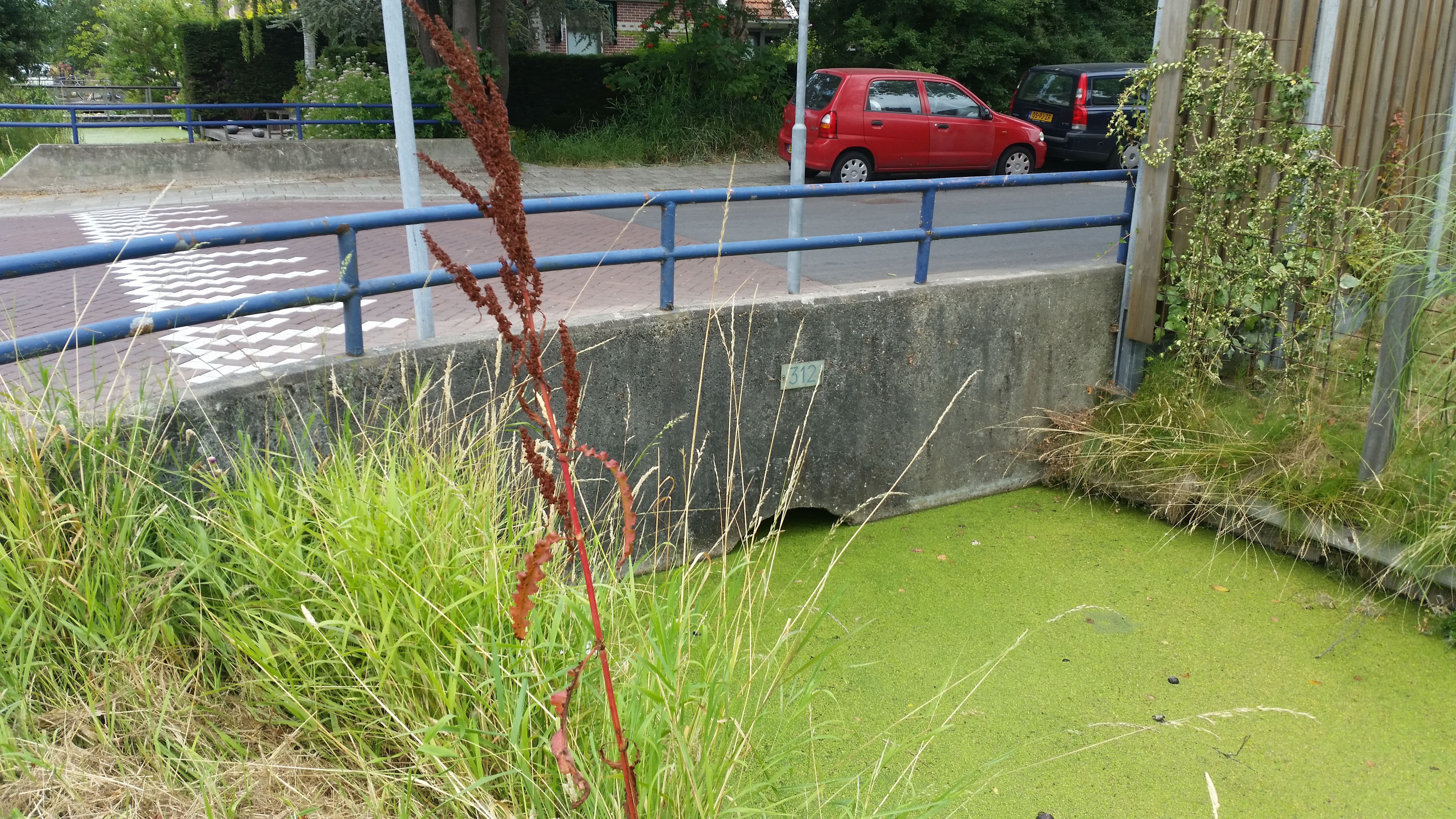 Brug 312 (Amsterdam-Noord), overzicht met nummerplaatje